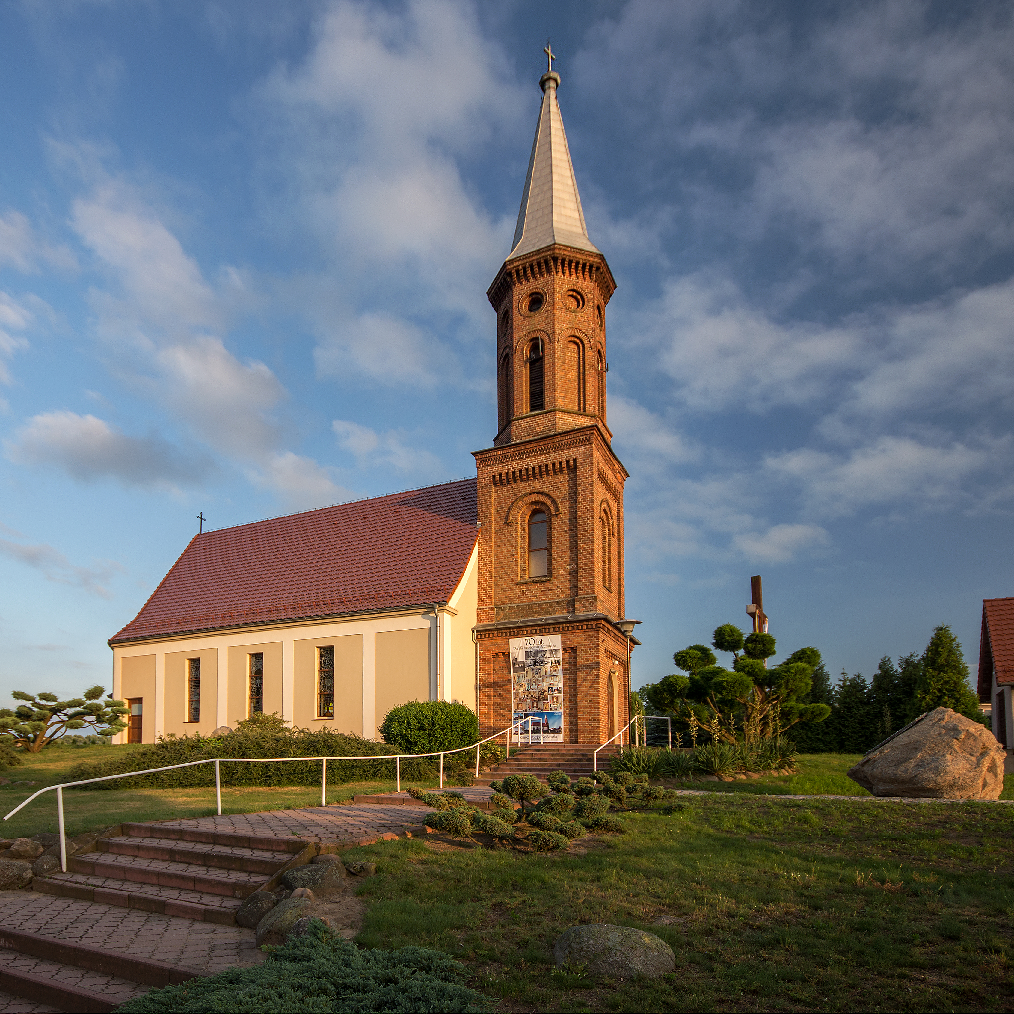 Skałągi, kościół ewangelicki, ob. rzym.-kat. par. p.w. św. Michała, 1791-1792, 1880